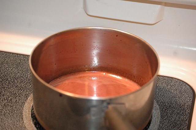 Réduction du vin rouge pour obtenir une gelée